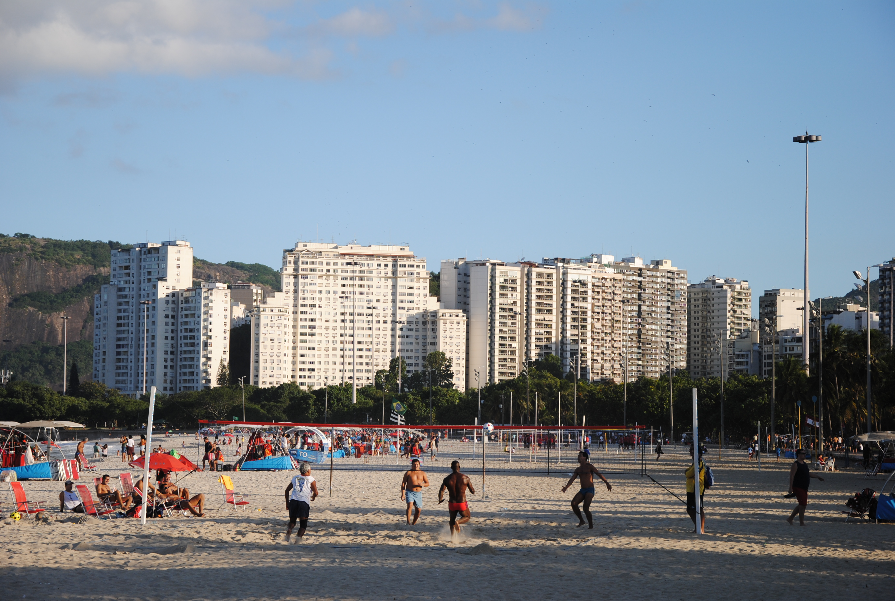 Footvolley. Rio de Janeiro, Brazil